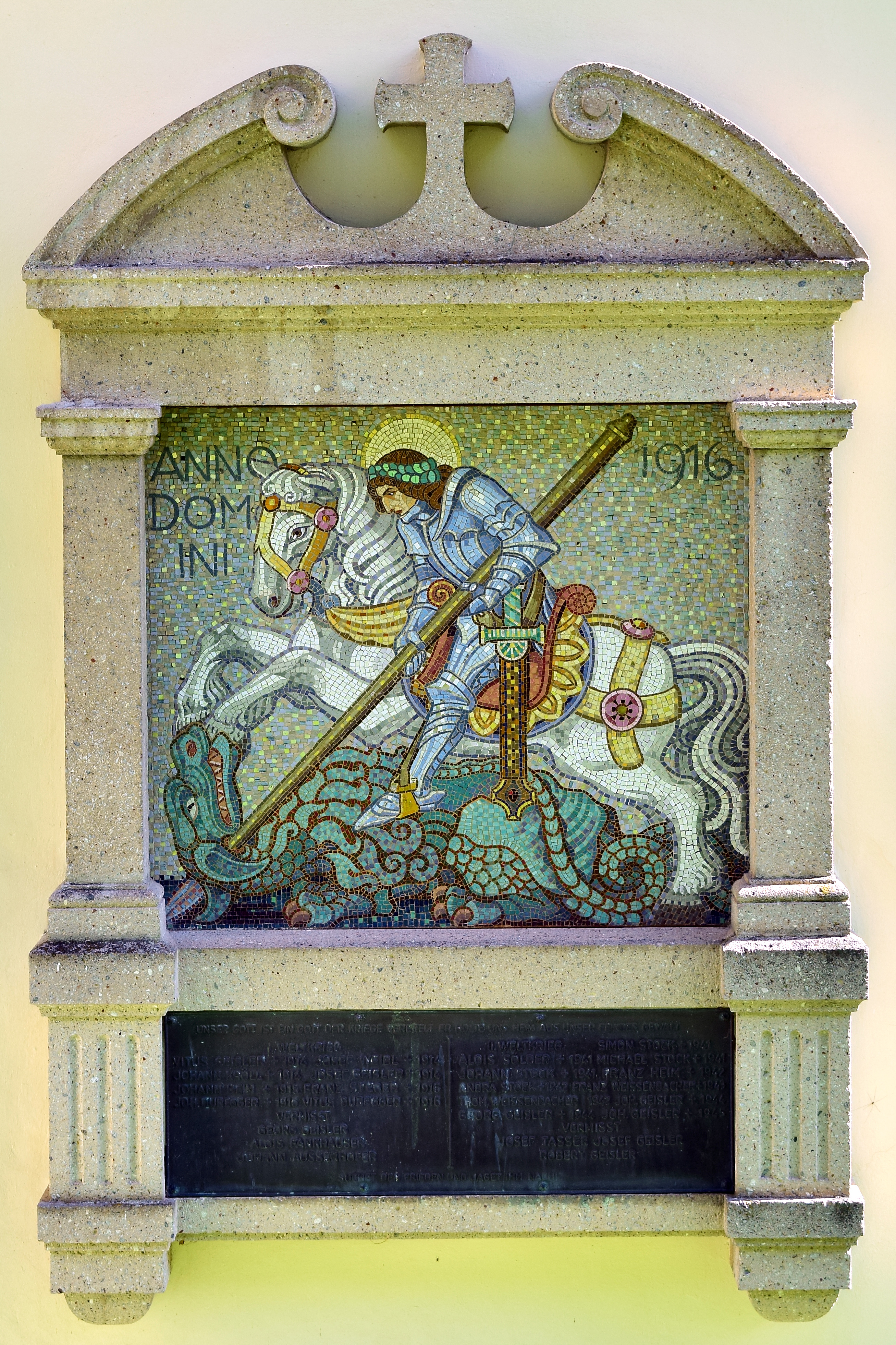 Kath. Pfarrkirche Hl. Kreuz in Brandberg befindliches Mosaik mit Krieger-Gedenktafel Erster und Zweiter Weltkrieg